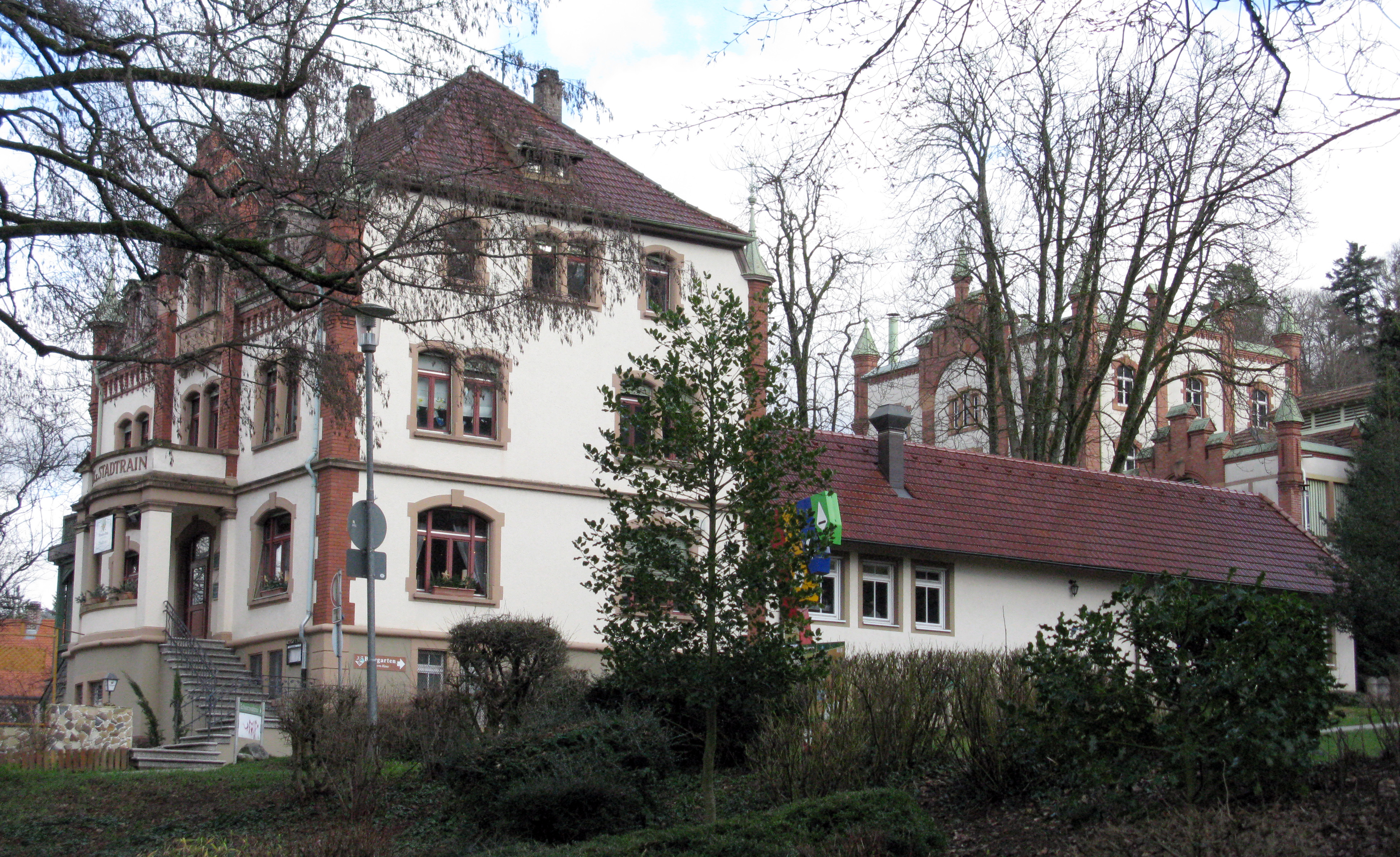 Hirschenbrauerei in Waldkirch mit vorgelagertem Gasthaus zum Stadtrain